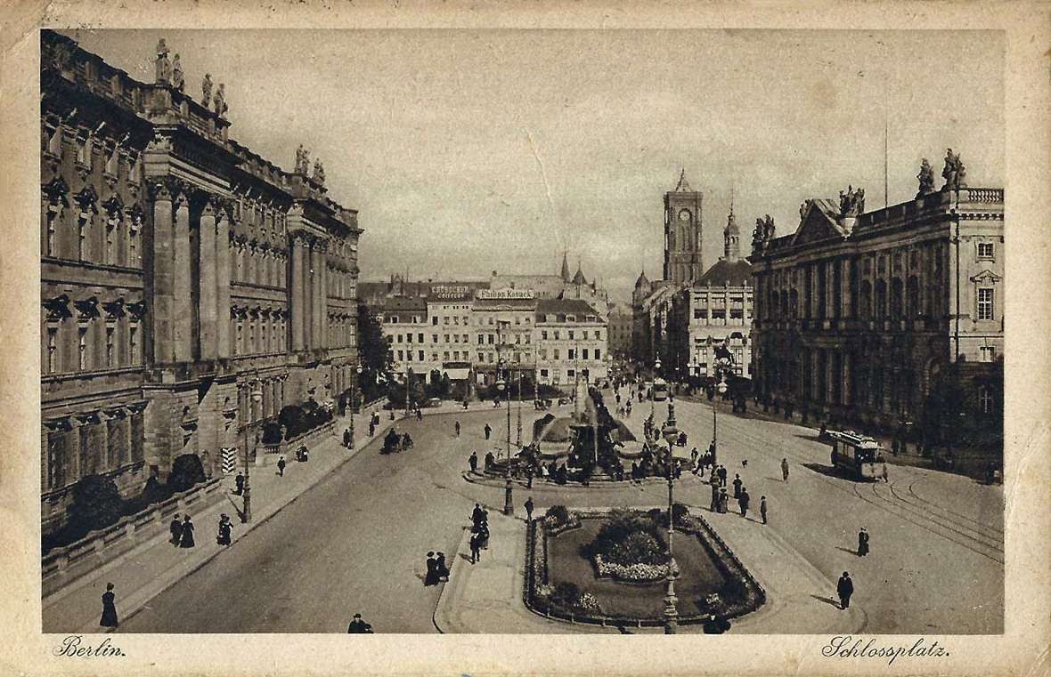 Vue de Berlin au début du XXe siècle (carte postale).